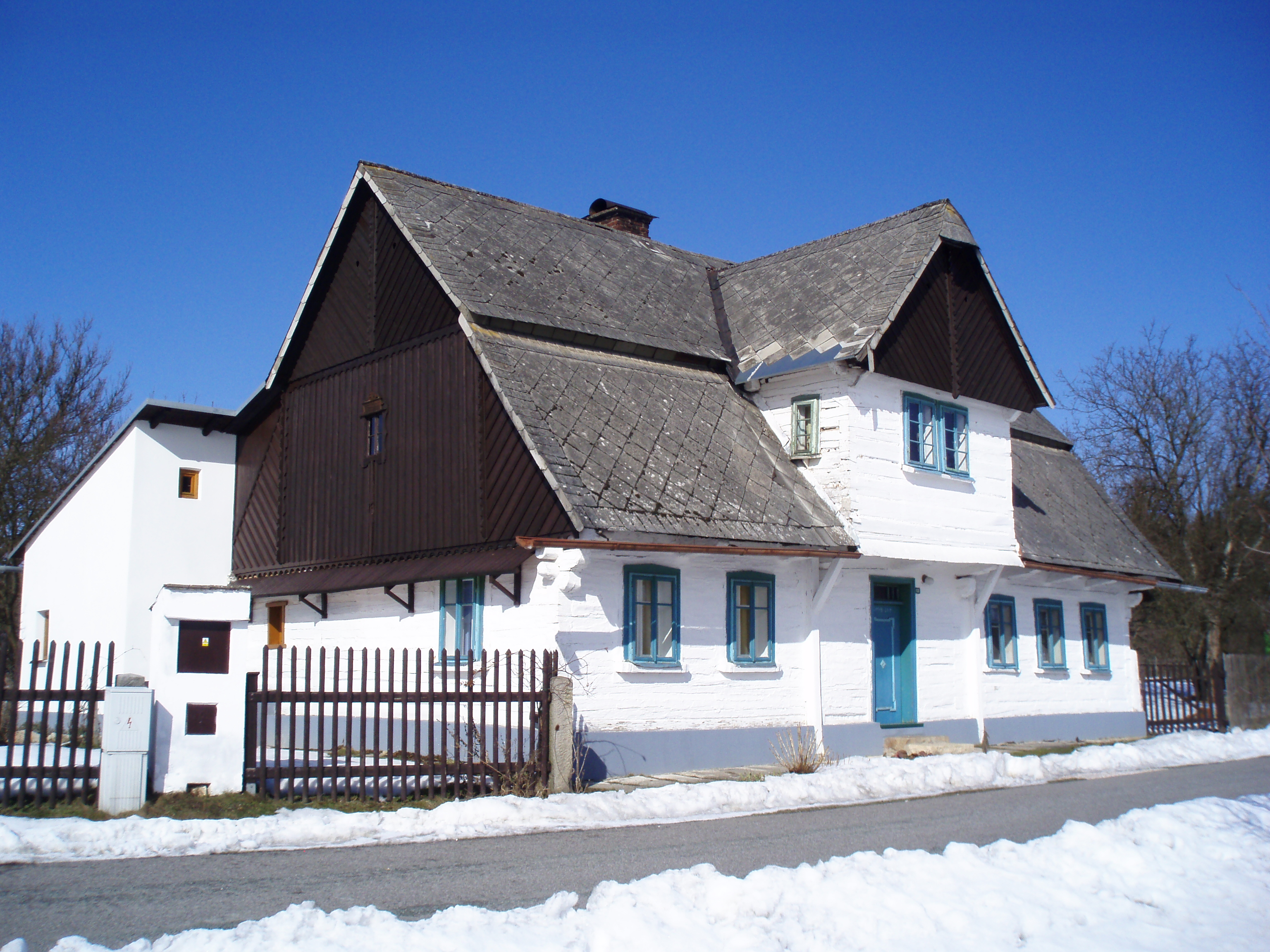 Boušín čp. 193 (Slatina nad Úpou)